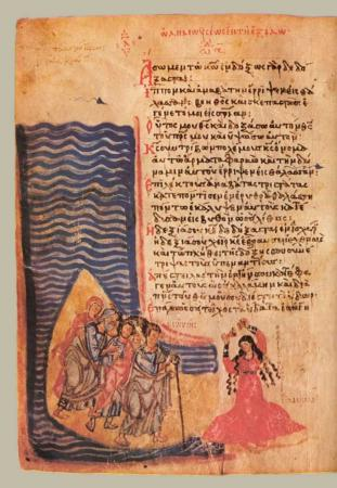 Khludov Psalter The first prophetic song.